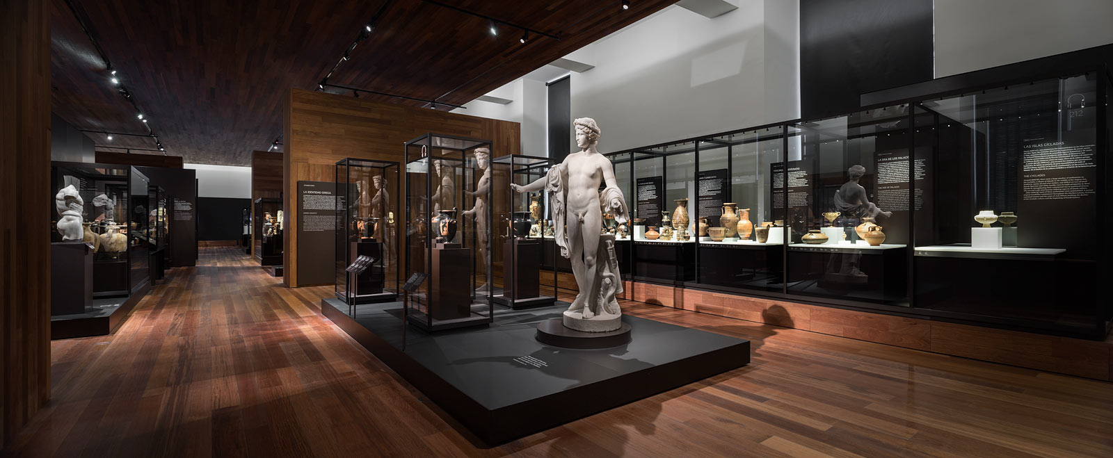 xyz